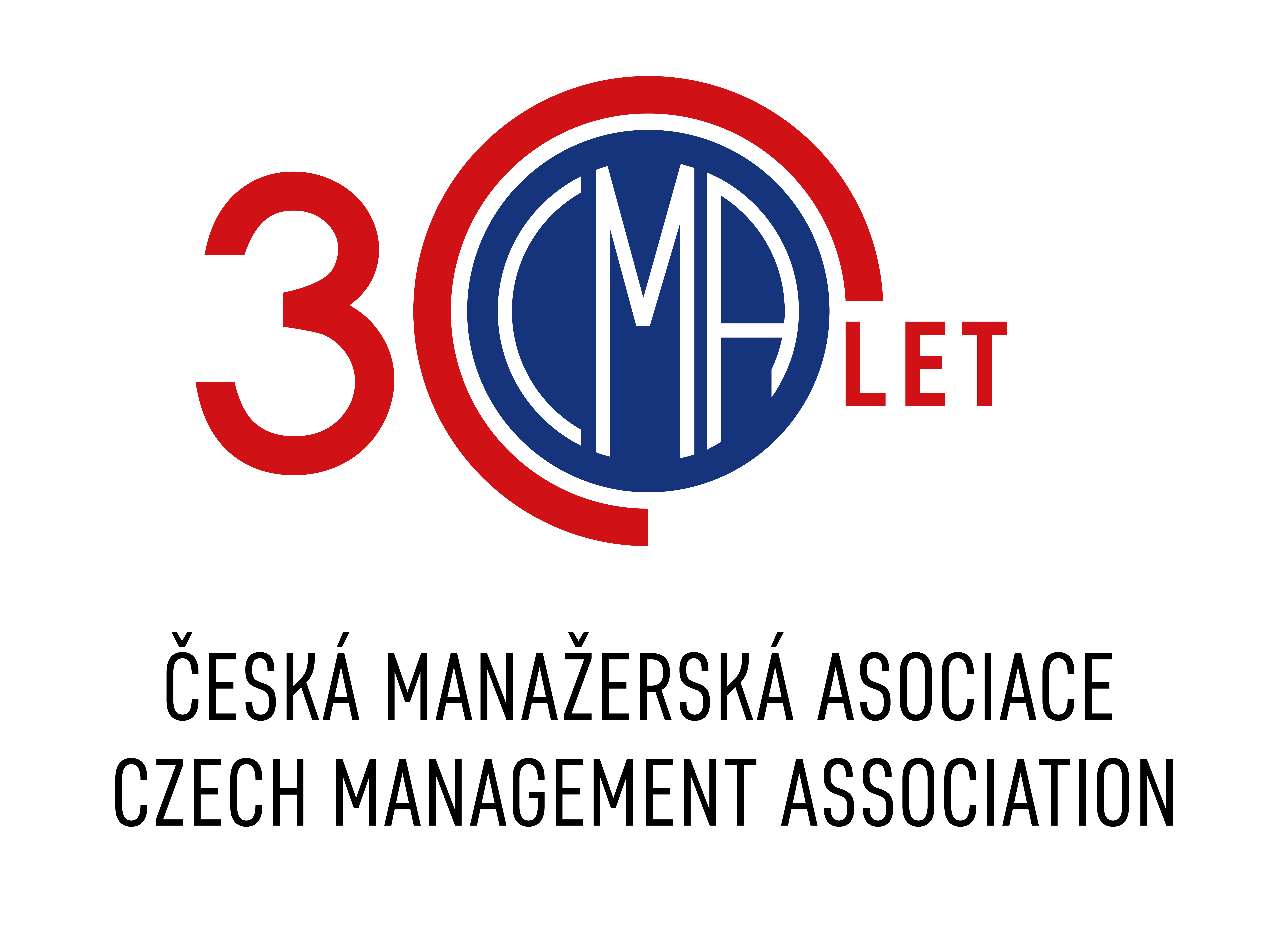 Logo ČMA